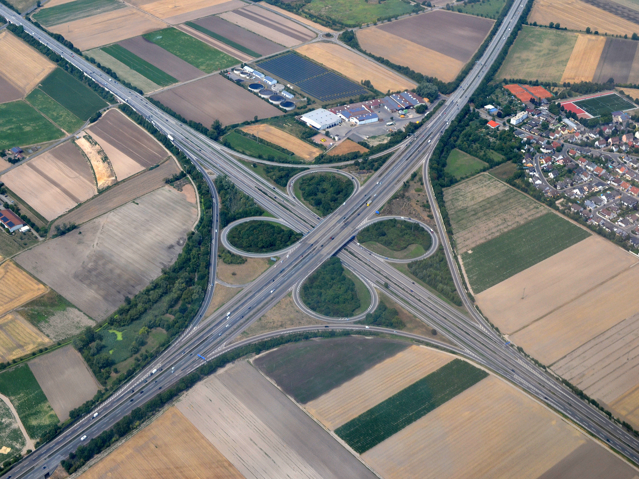 Das Frankenthaler-Kreuz von Süd-Osten gesehen